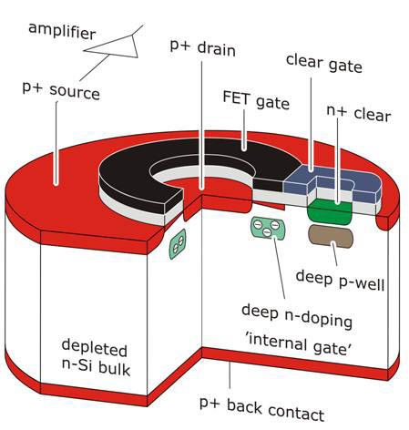 schematischer Aufbau einer einzelnen DePFET-Zelle.